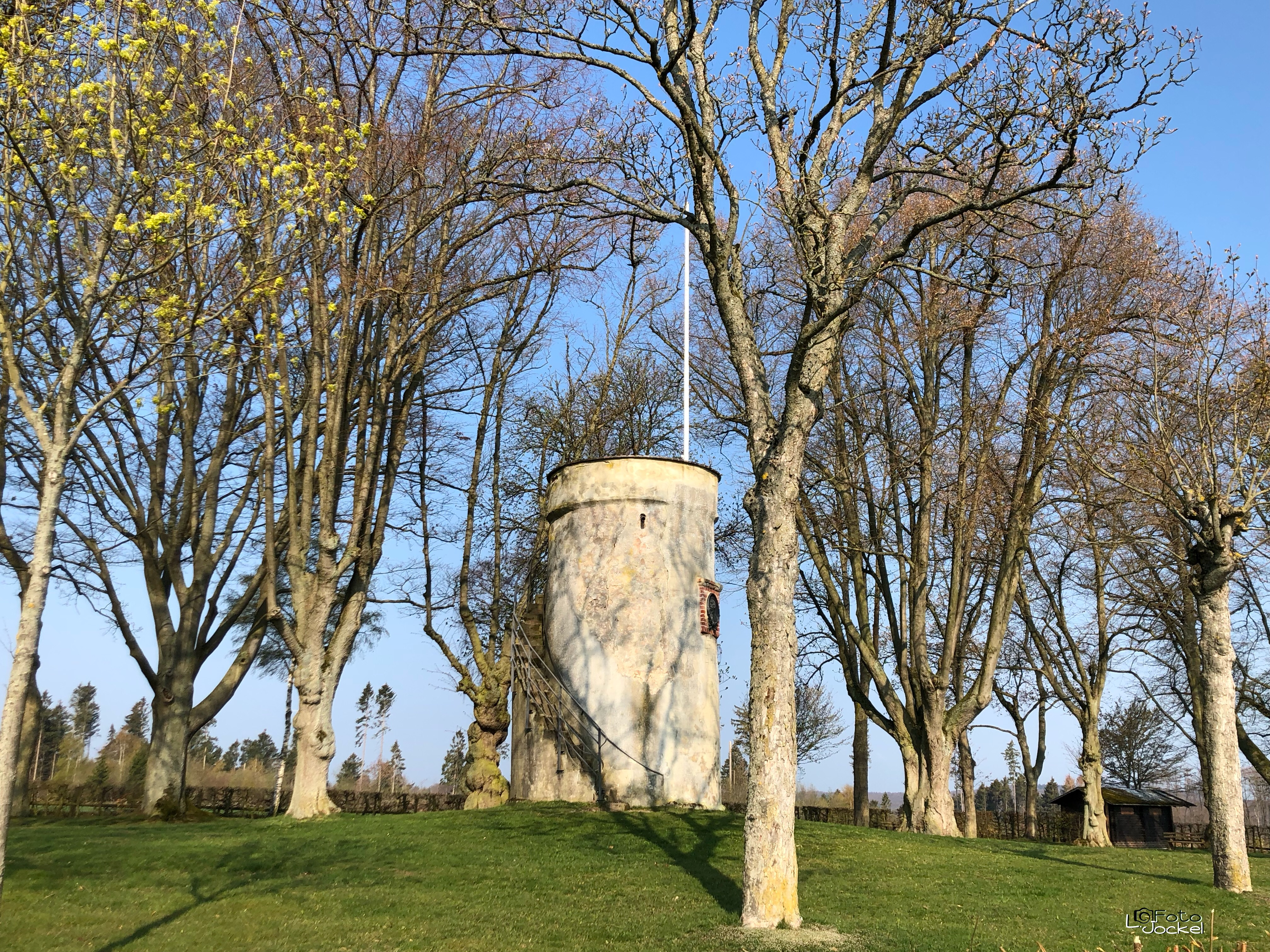 Warte